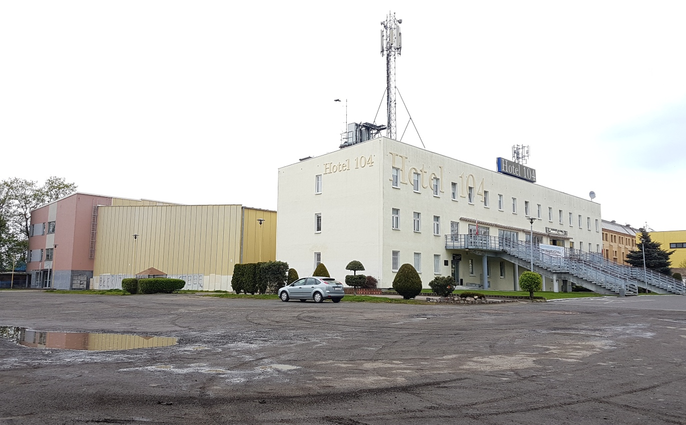 Stargard, 05.05.2017r. Hotel 104 wraz z halą OSiR